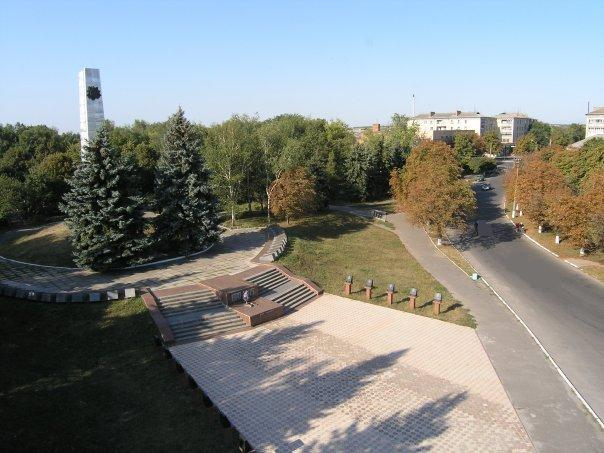 Решетиловка